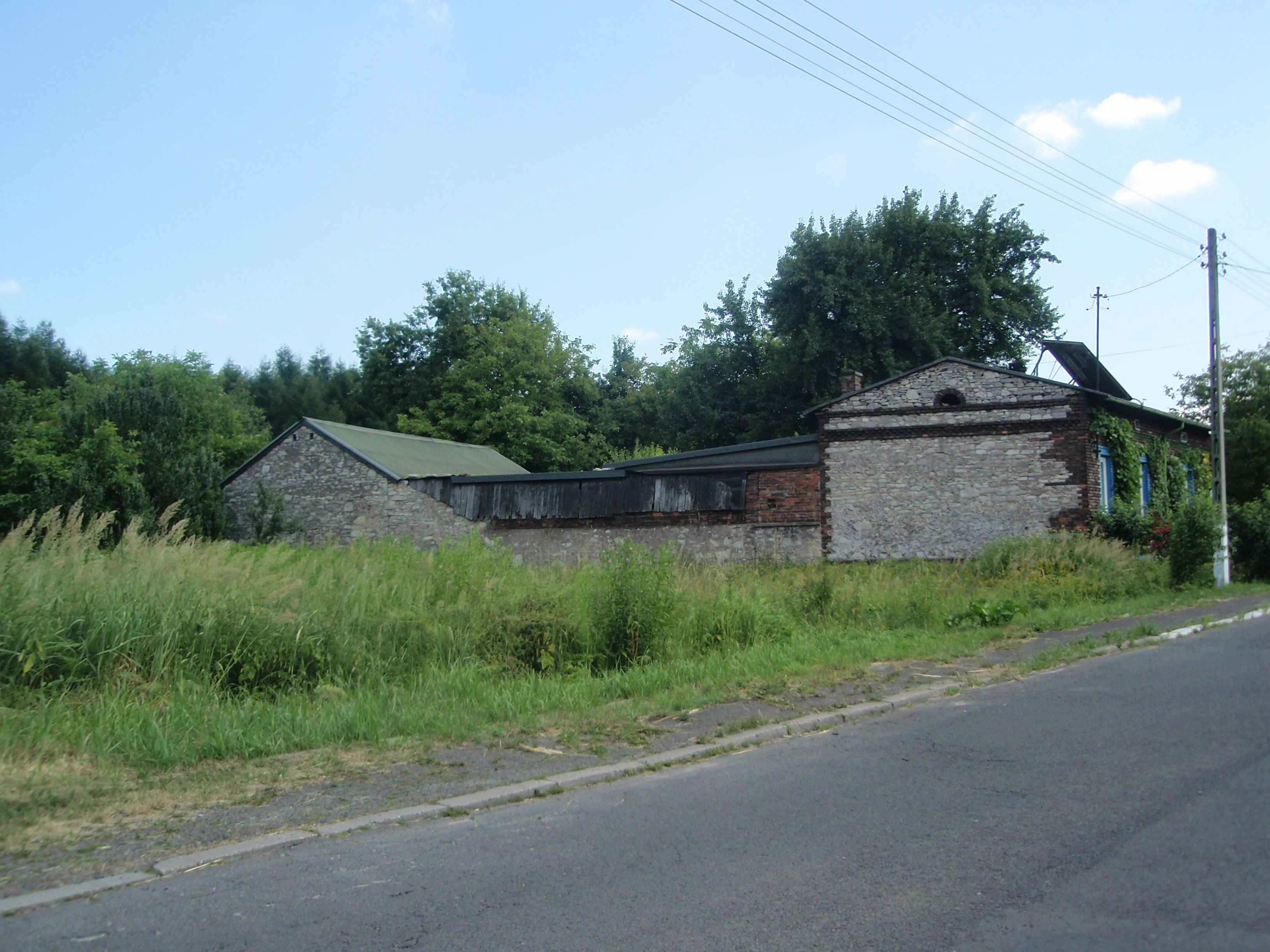 Budynki przy ul. Kazdębie w Dąbrowie Górniczej-Strzemieszycach Małych